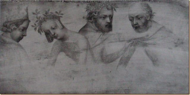 Le carnet de dessin de Jacquemart de Hesdin/ Charles VI avec Isabeau de Bavière et deux personnages de la cour Il s'agit d'un petit carnet conservé à la Bibliothèque Pierpont Morgan de New york cote M.346, composé de 7 folios. Son matériau est particulier, il s'agit de petites planches fines de buis recouverte d'un gesso crayeux blanc (12,9 x 7 cm) relié par de fines bandes de parchemin. ce support était beaucoup utilisé par les artistes car il permettait un effacement rapide du dessin ou du croquis antérieur ; excellent pour le dessin d'étude et les exercices. La preuve dans ce carnet qu'utilise Jacquemart de Hesdin Peintre enlumineur des années 1380-1400 car il a ajouté ou remplacé ces propres compostions à des dessins antérieur de 30 ans au moins; les premiers dessins de ce carnet sont attribué à l'atelier de Jean Pucelle ou au Maître du Remède de Fortune c'est a dire vers 1350-1360. Ce carnet sera d'ailleurs complété par un maitre allemand anonyme vers 1450. ce parcours est significatif de la transmission des précieux modèles au Moyen Age.